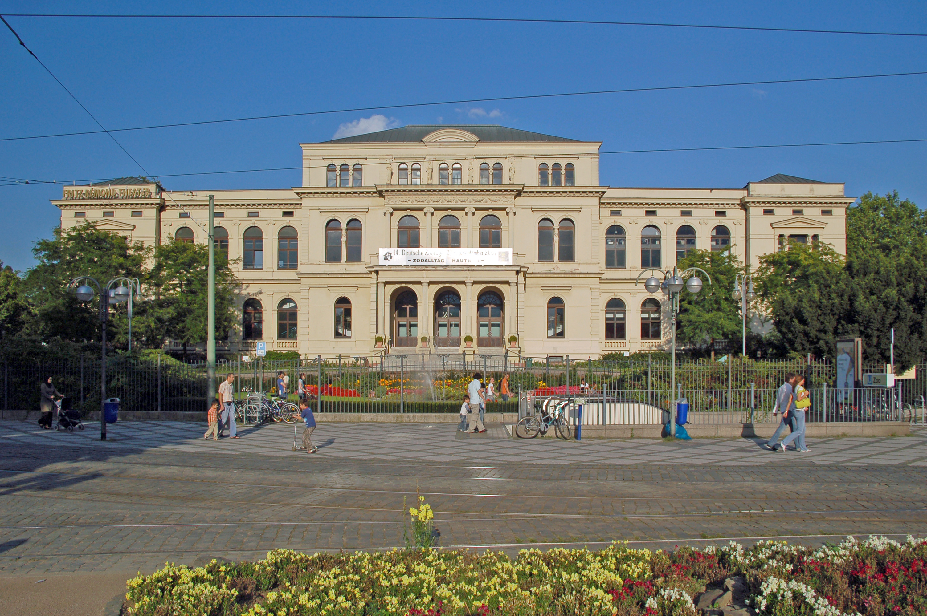 Palais im Zoo (früher: Zoo-Gesellschaftshaus), Zoo Frankfurt am Main, Bernhard-Grzimek-Allee 1